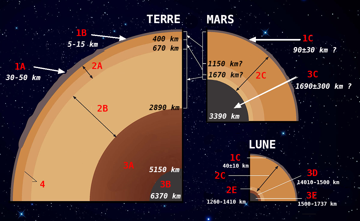 Schéma représentant les similarités et les différences de la structure interne de la Terre, de Maris et de la Lune : 1A Croûte continentale et 1B océanique de la Terre - 1C Croûte basaltique de Mars et de la Lune - 2A Manteau supérieur et 2B inférieur de la Terre - 2C Manteau de Mars et de la Lune - 2E Manteau partiellement fondu de la Lune - 3A Noyau liquide et 3B solide de la Terre - 3C Noyau de Mars liquide ou solide ? - 3D Noyau liquide et 3E solide de la Lune - 4 Discontinuités.